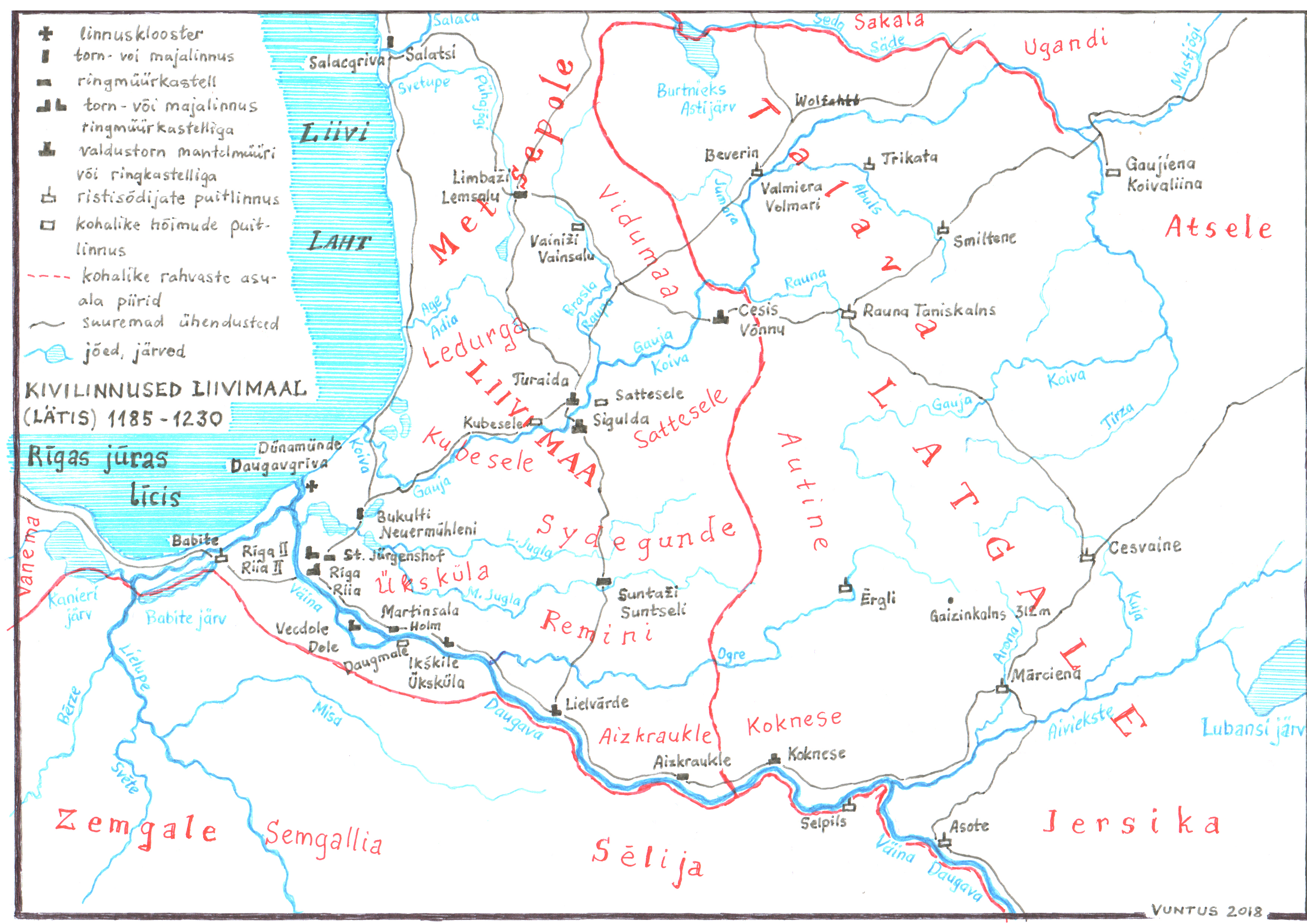 Läti kivilinnused 1185-1230.